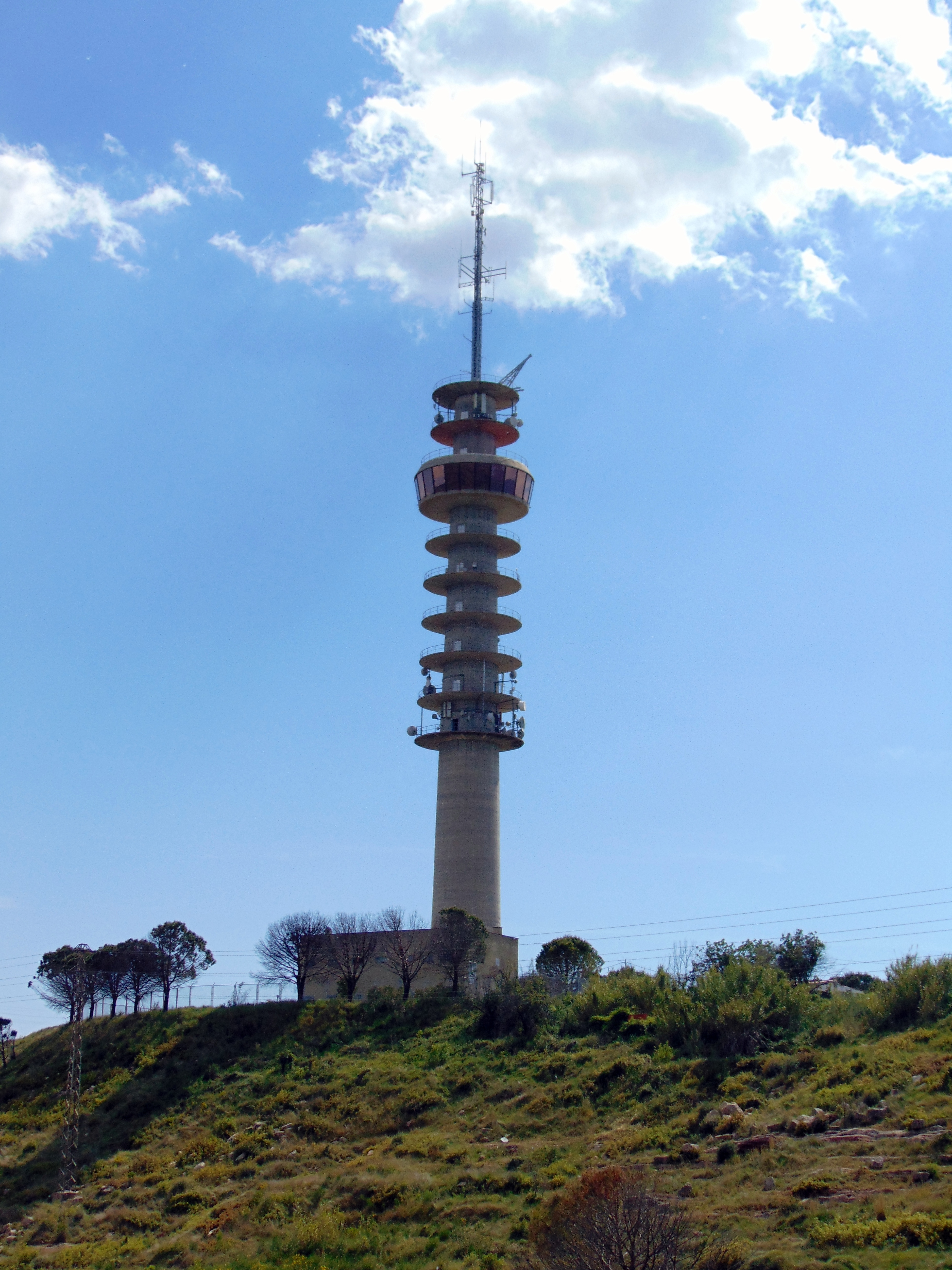 Pirulí de Girona